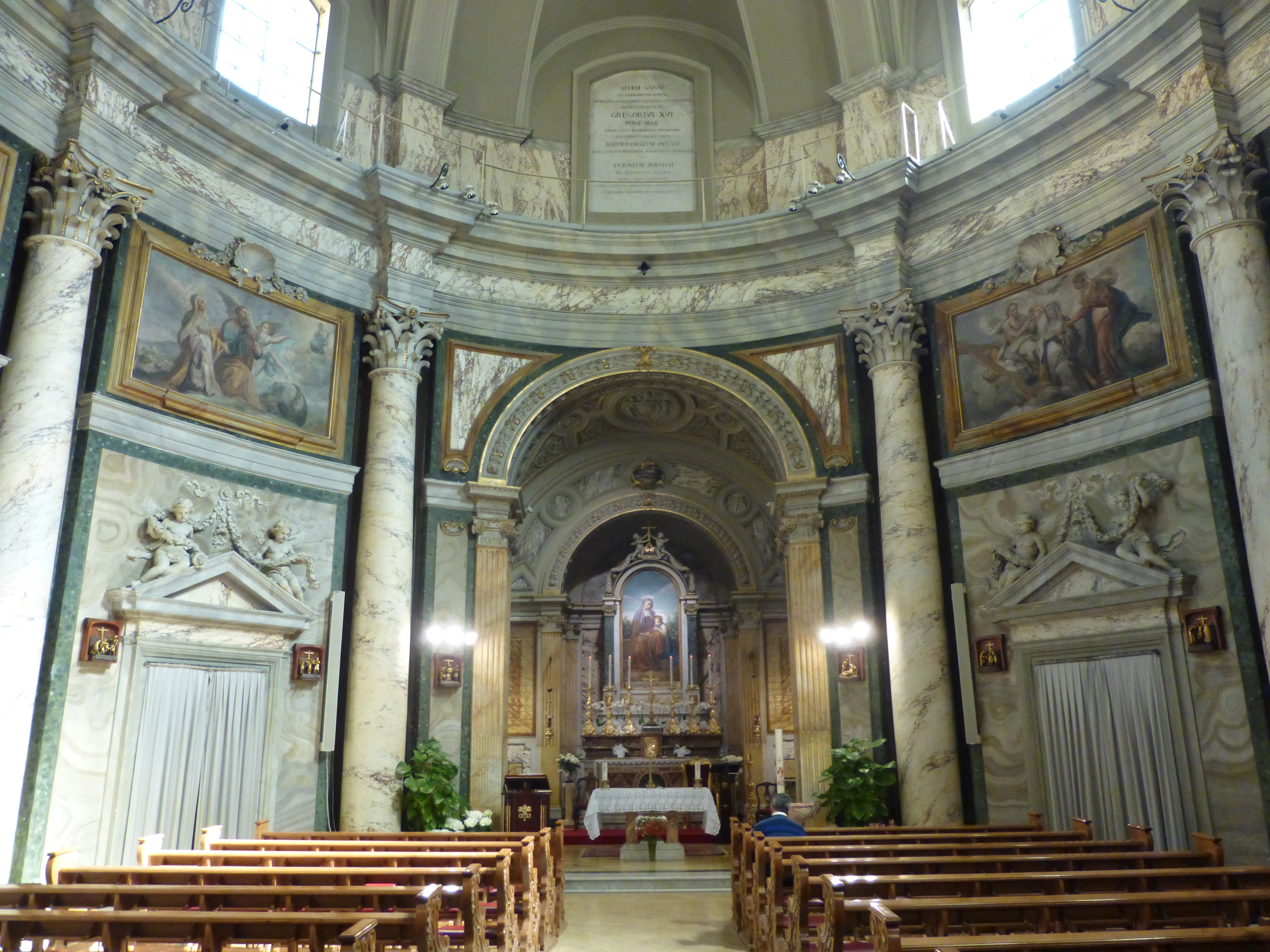 Città del Vaticano. S. Anna dei Palafrenieri, interno.